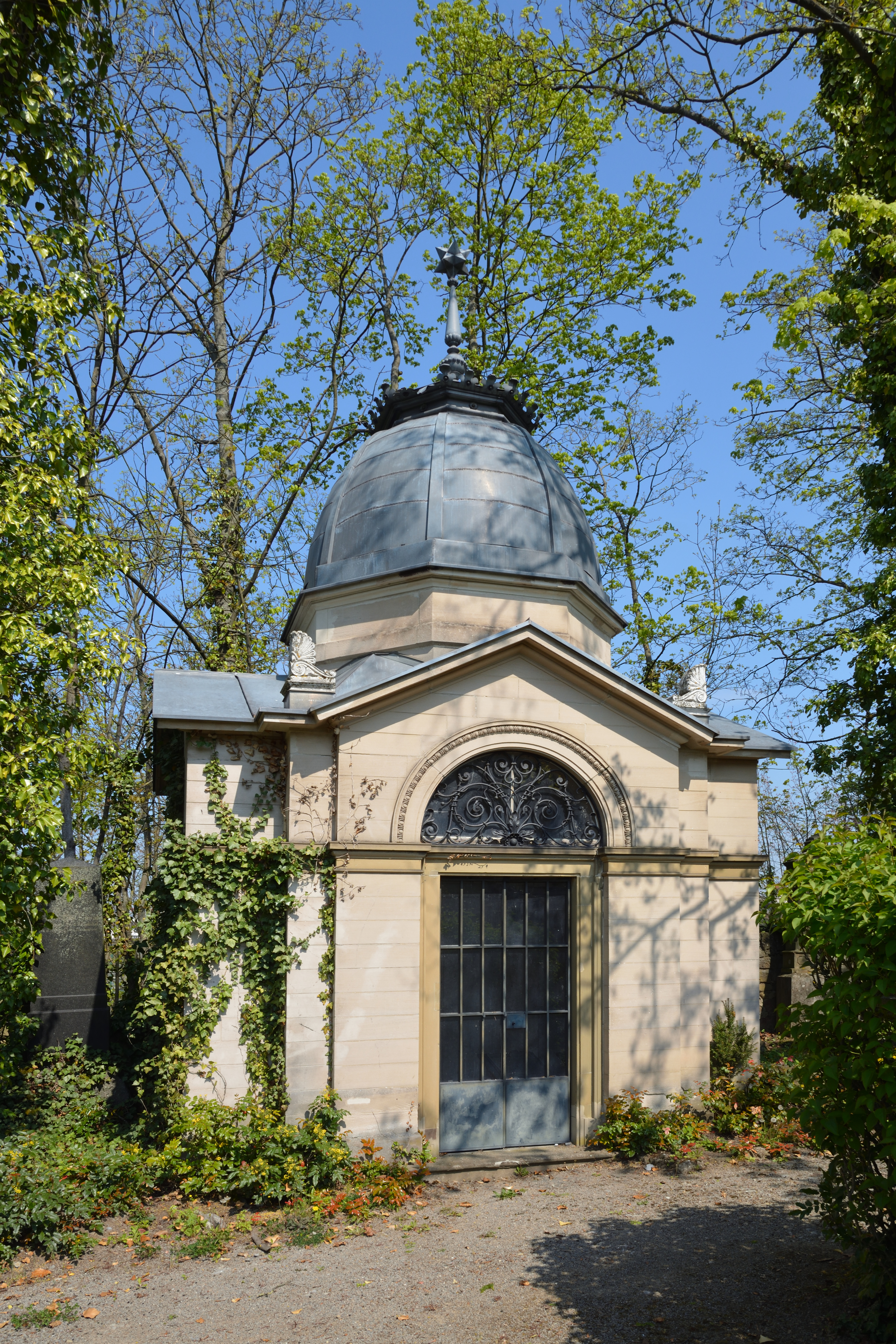 Impressionen vom jüdischen Friedhof in Würzburg.